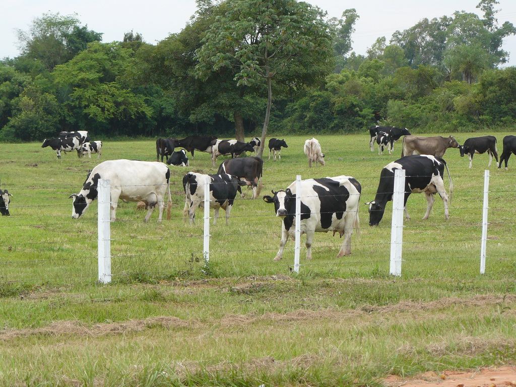 Paraguay. Ganado vacuno.